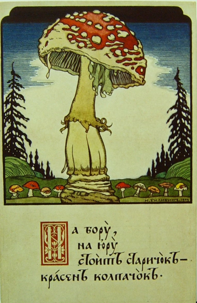 Гриб